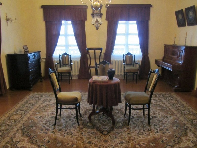 Экспазіцыя ў Кушлянах